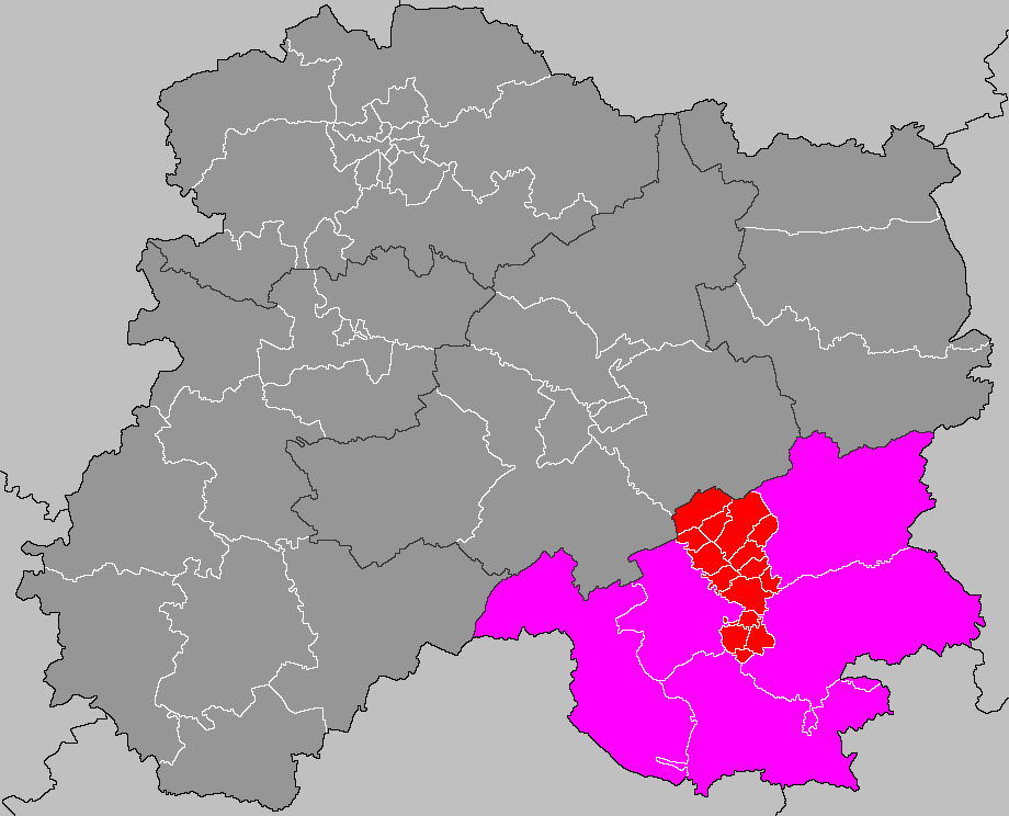 Localisation du canton de Vitry-le-François-Est